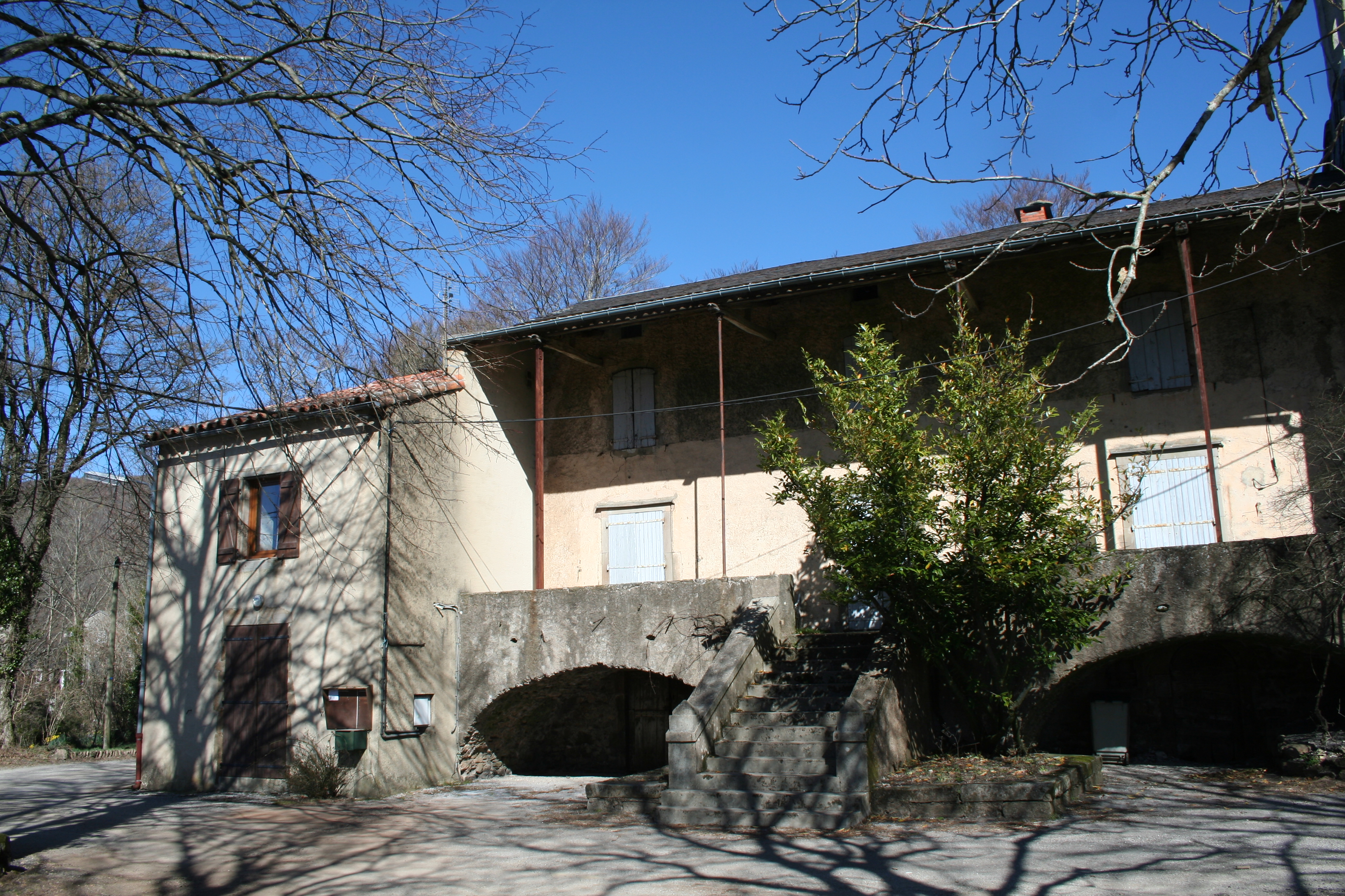 Castanet-le-Haut (Hérault) - école (fermée en 1952) et presbytère (avant modifications en 2014) de l'église de Saint-Amans-de-Mounis